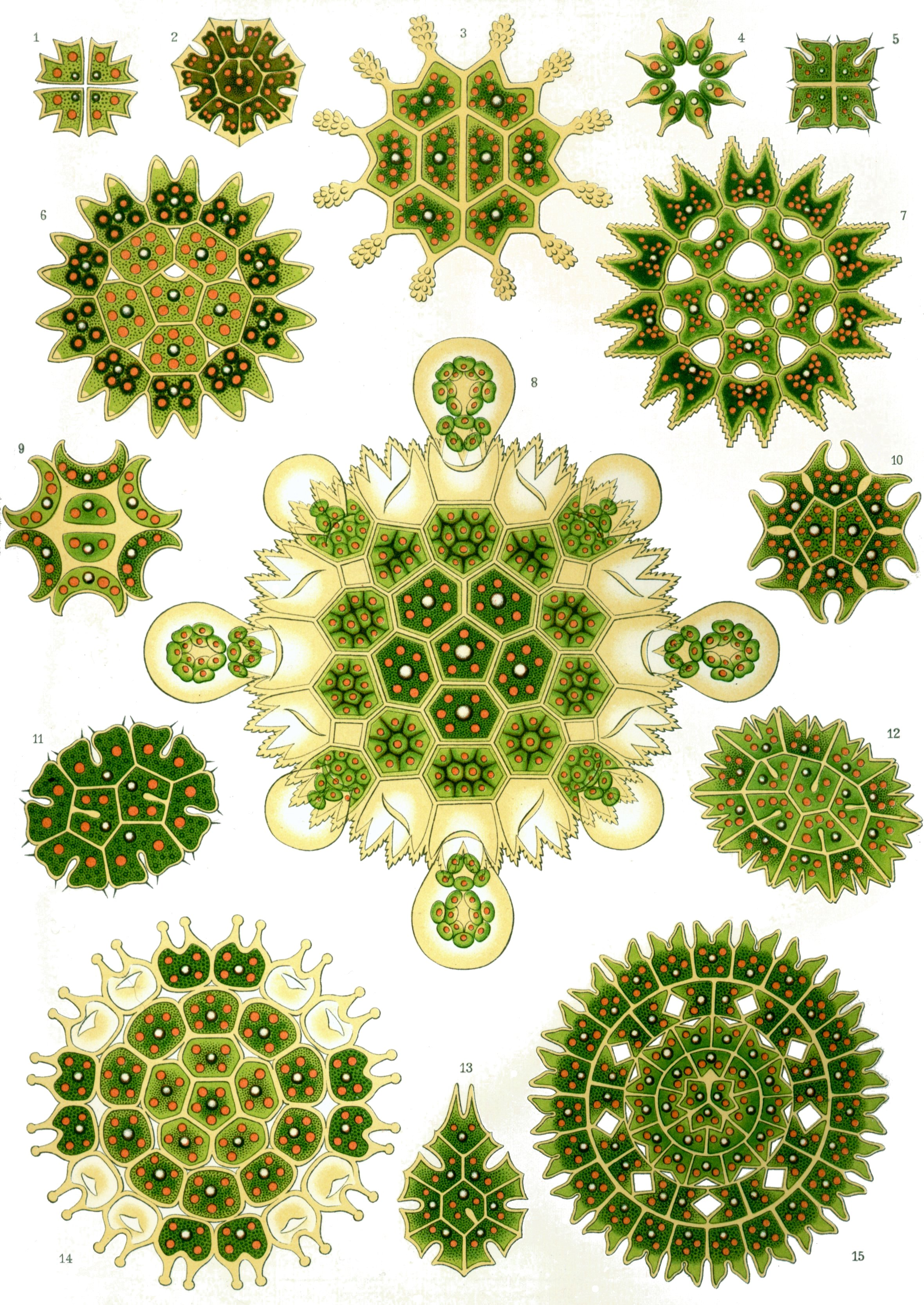 See full-size image for index to numbers. Pediastrum tetras (Ehrenberg) = Stauridium tetras (Ehrenberg) E.Hegewald Pediastrum rotula (Kützing) = Pediastrum rotula (Ehrenberg) Kützing = Parapediastrum biradiatum (Meyen) E.Hegewald Pediastrum granulatum (Kützing) = Pediastrum boryanum (Turpin) Meneghini = Pseudopediastrum boryanum (Turpin) E.Hegewald Pediastrum octonum (Haeckel) = Pediastrum octonum Haeckel? Pediastrum cruciatum (Haeckel) = "Pediastrum cruciatum" Haeckel (non Kützing: preoccupied)? Pediastrum selenaea (Kützing) = Pediastrum duplex Meyen Pediastrum pertusum (Kützing) = Pediastrum duplex Meyen Pediastrum elegans (Haeckel) = "Pediastrum elegans" Haeckel (non Hassall: preoccupied)? Pediastrum lunatum (Haeckel) = Pediastrum lunatum Haeckel? Pediastrum furcatum (Haeckel) = Pediastrum furcatum Haeckel? Pediastrum braunii (Haeckel) = Pediastrum braunii Wartmann? Pediastrum ellipticum (Ehrenberg) = Pediastrum ellipticum (Ehrenberg) Hassall ex Ralfs? Pediastrum darwinii (Haeckel) = Pediastrum darwinii Haeckel? Pediastrum trochiscus (Haeckel) = Pediastrum trochiscus Haeckel? Pediastrum solare (Haeckel) = Pediastrum solare Haeckel?